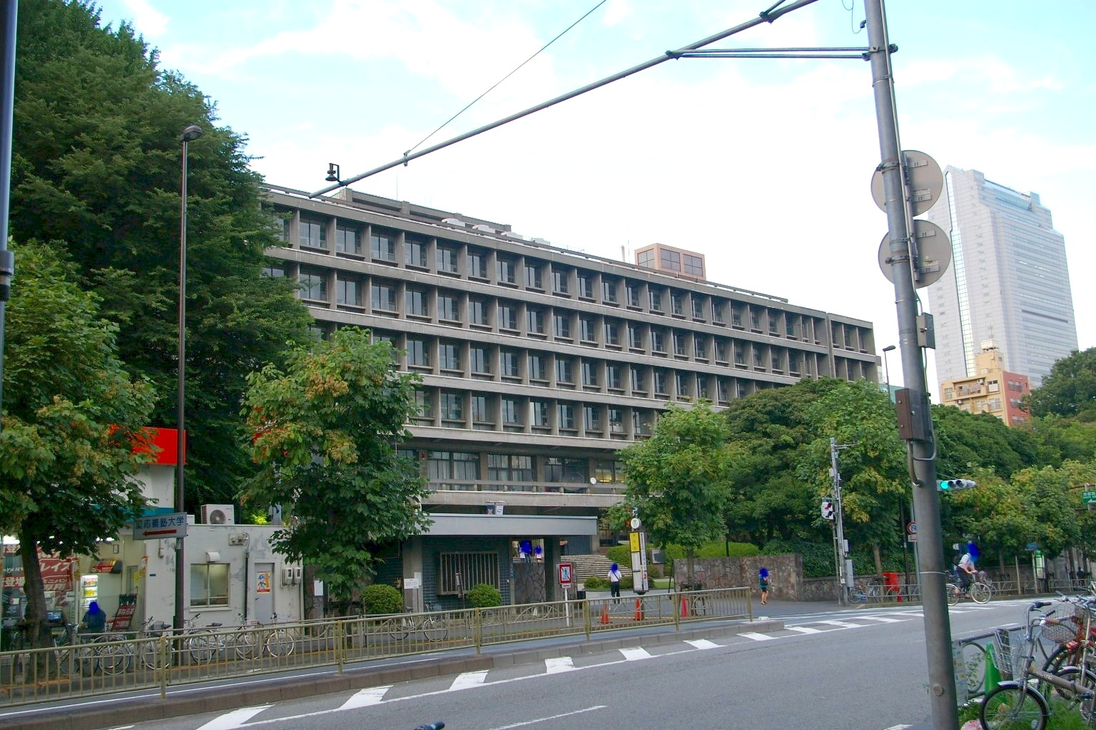 I took it myself in Tokyo.